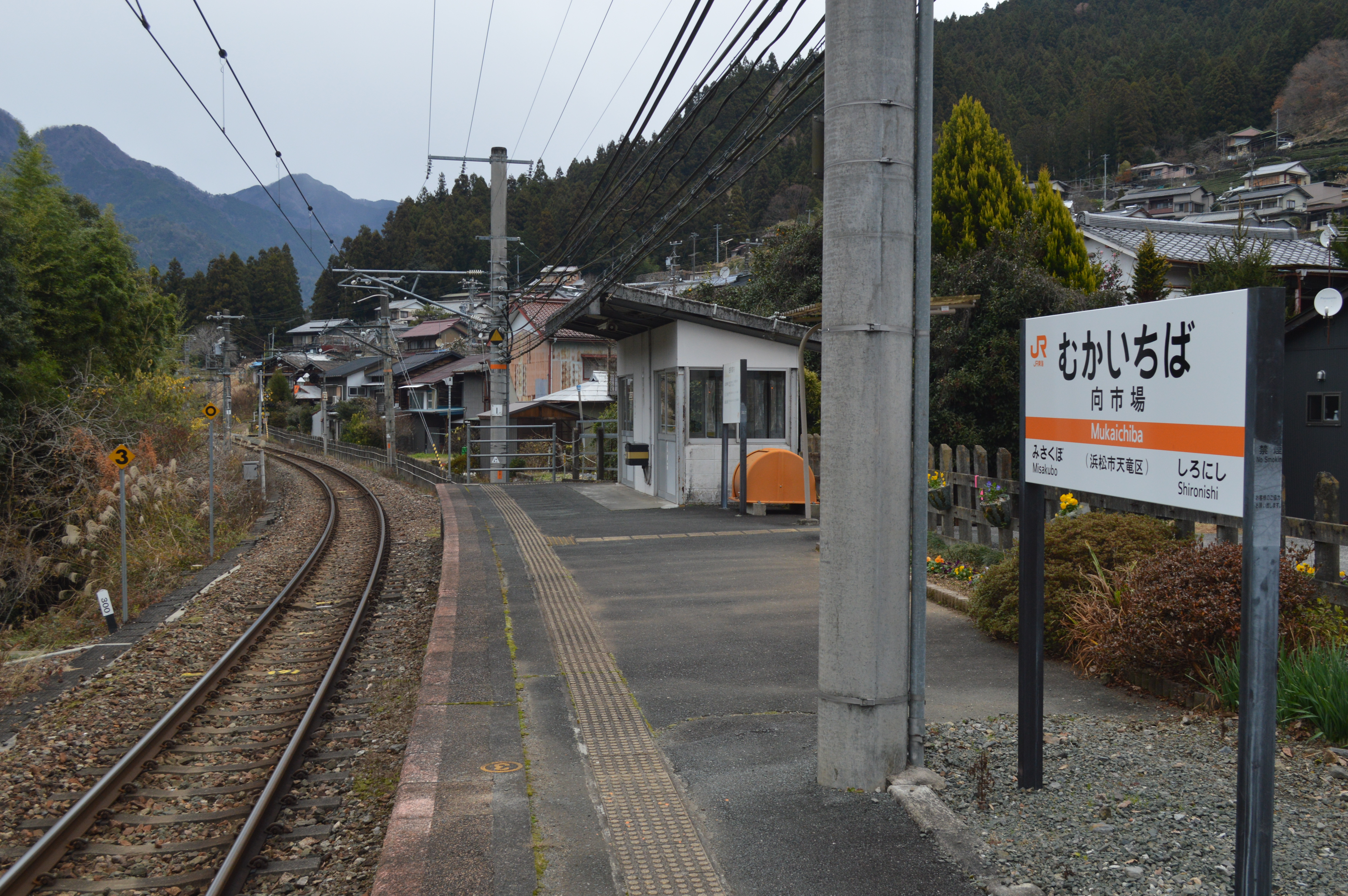 JR飯田線向市場駅。静岡県浜松市天竜区水窪町。